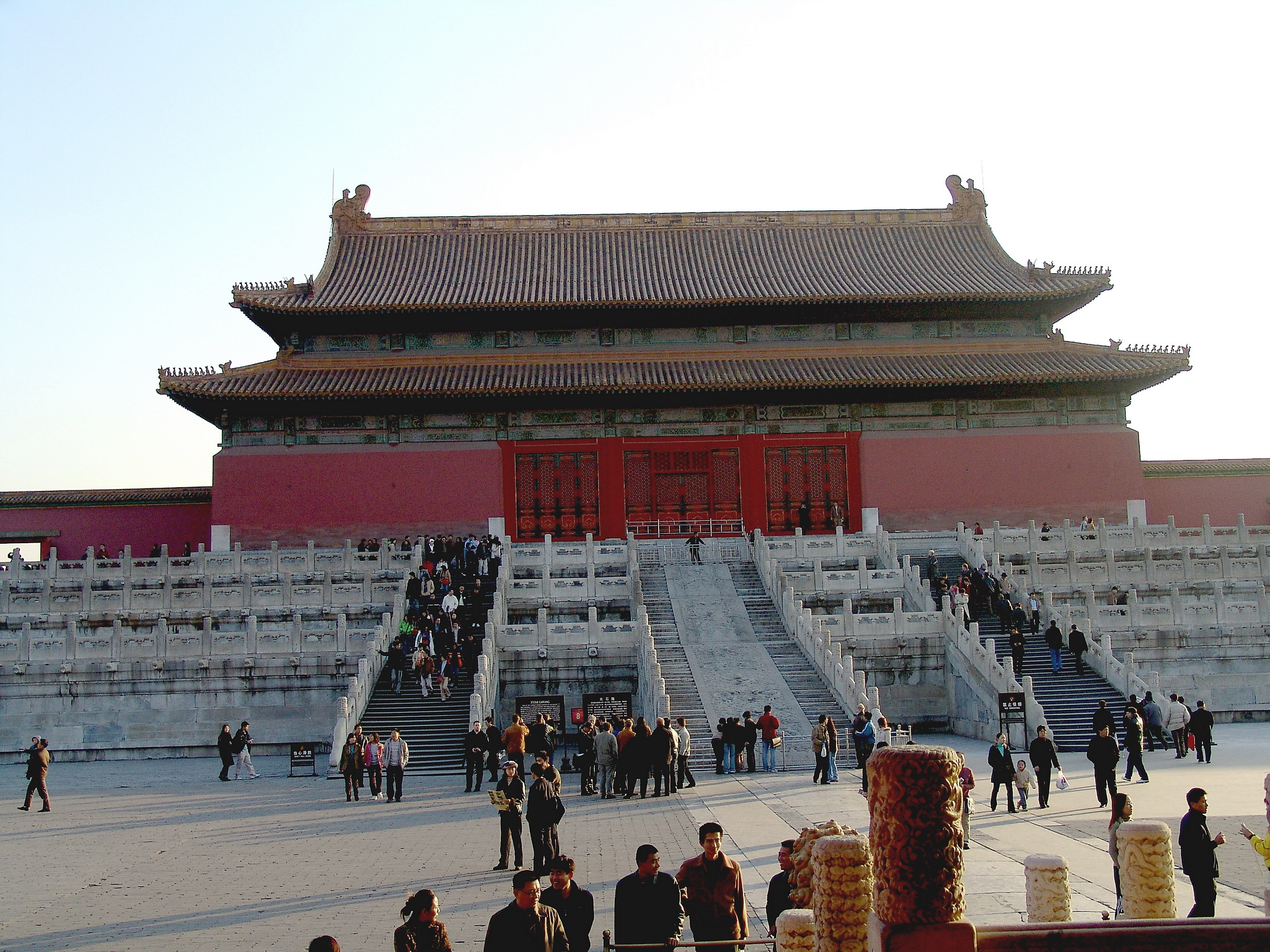 Forbidden City